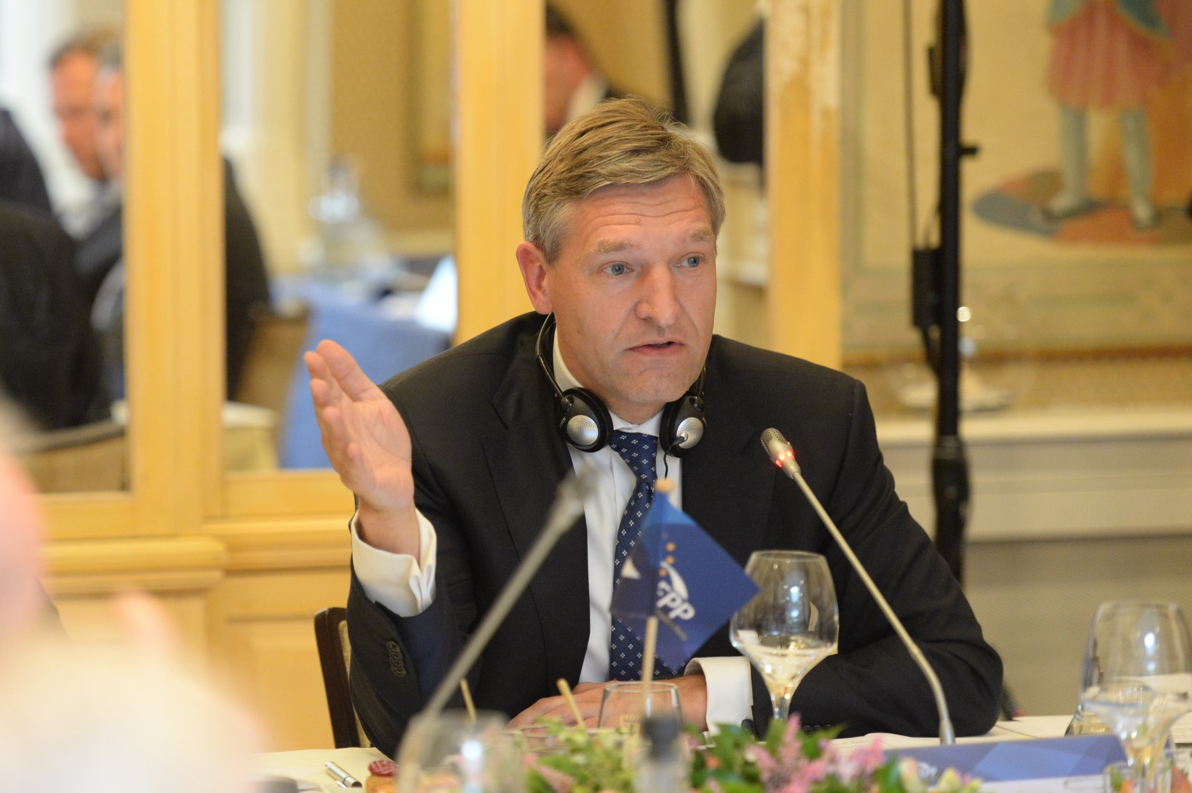 Sybrand van Haersma Buma op het EPP congres in 2015